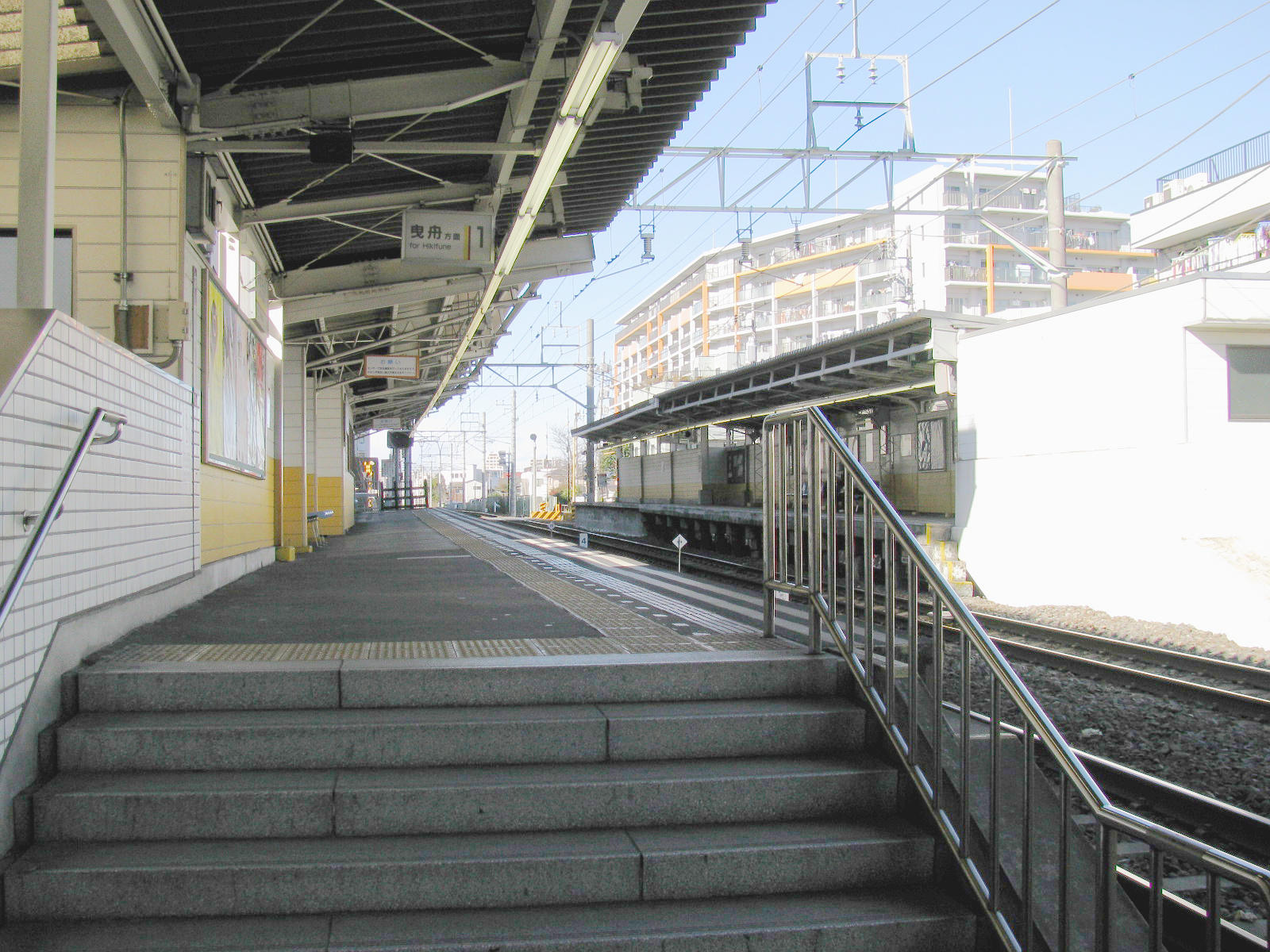 東武亀戸線小村井駅